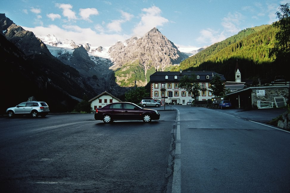 Pohled na Ortler Alpy z Trafoi